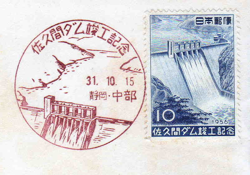 佐久間ダム竣工記念切手に押印された静岡県中部郵便局の記念印。